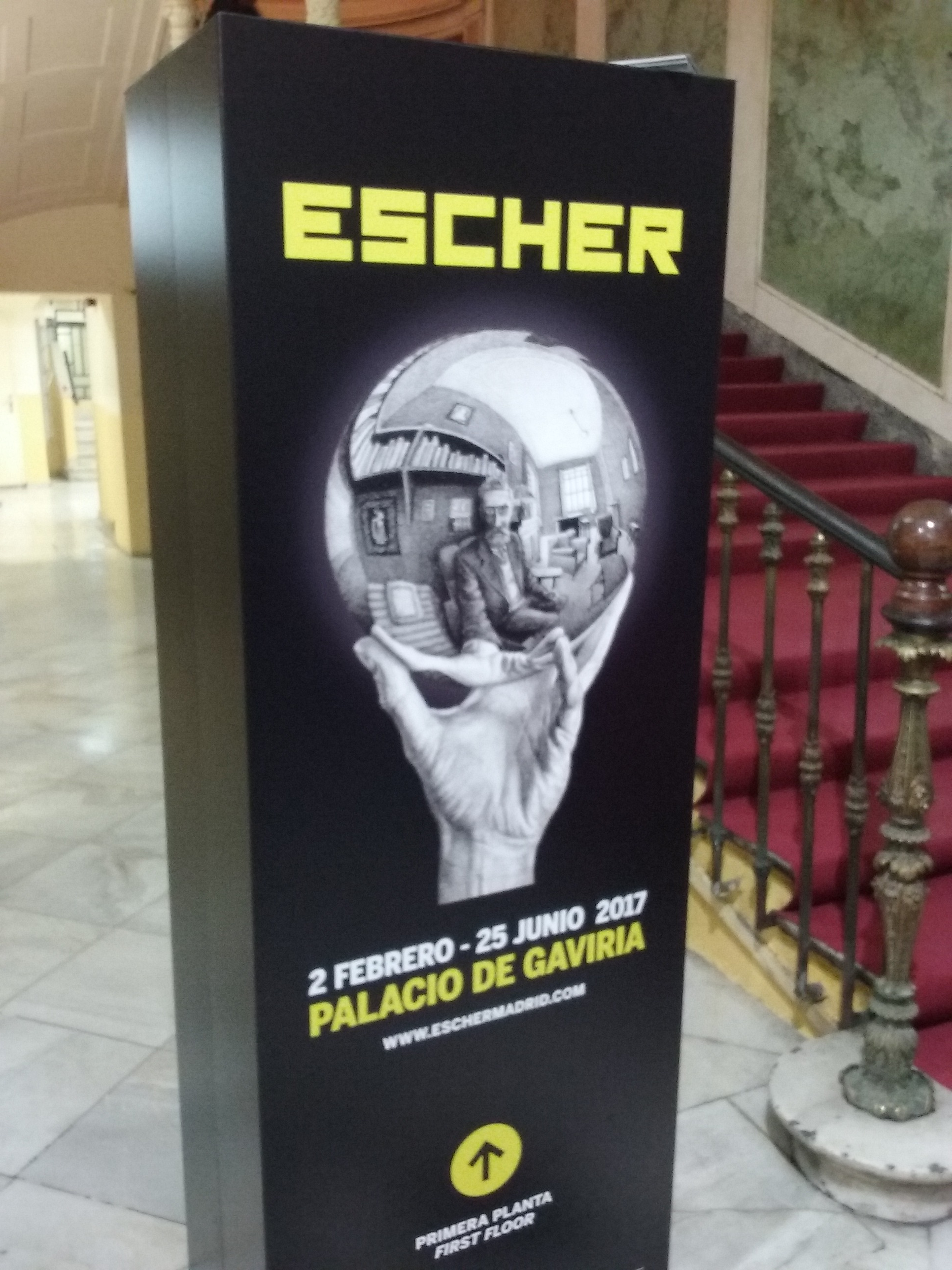 Cartel anunciador de la Exposición dedicada a Escher en el Palacio de Gaviria de Madrid (2 de febrero-25 de junio de 2017)